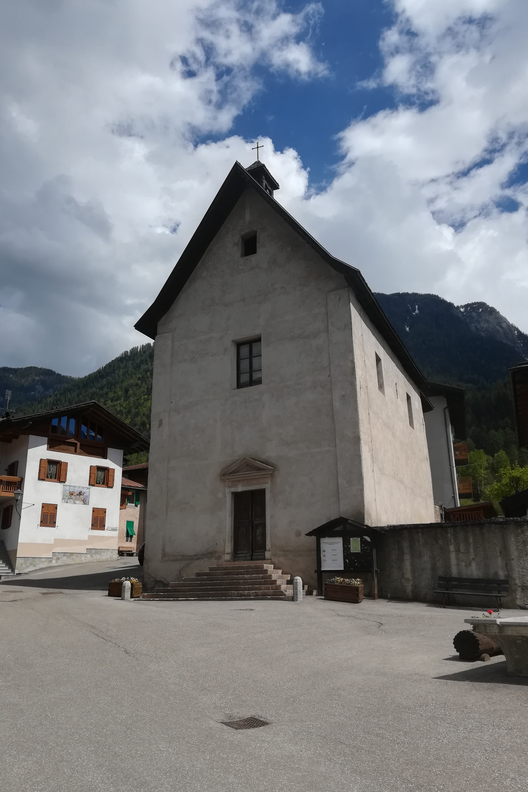 Chiesa della Natività di San Giovanni Battista a Carciato nel 2019